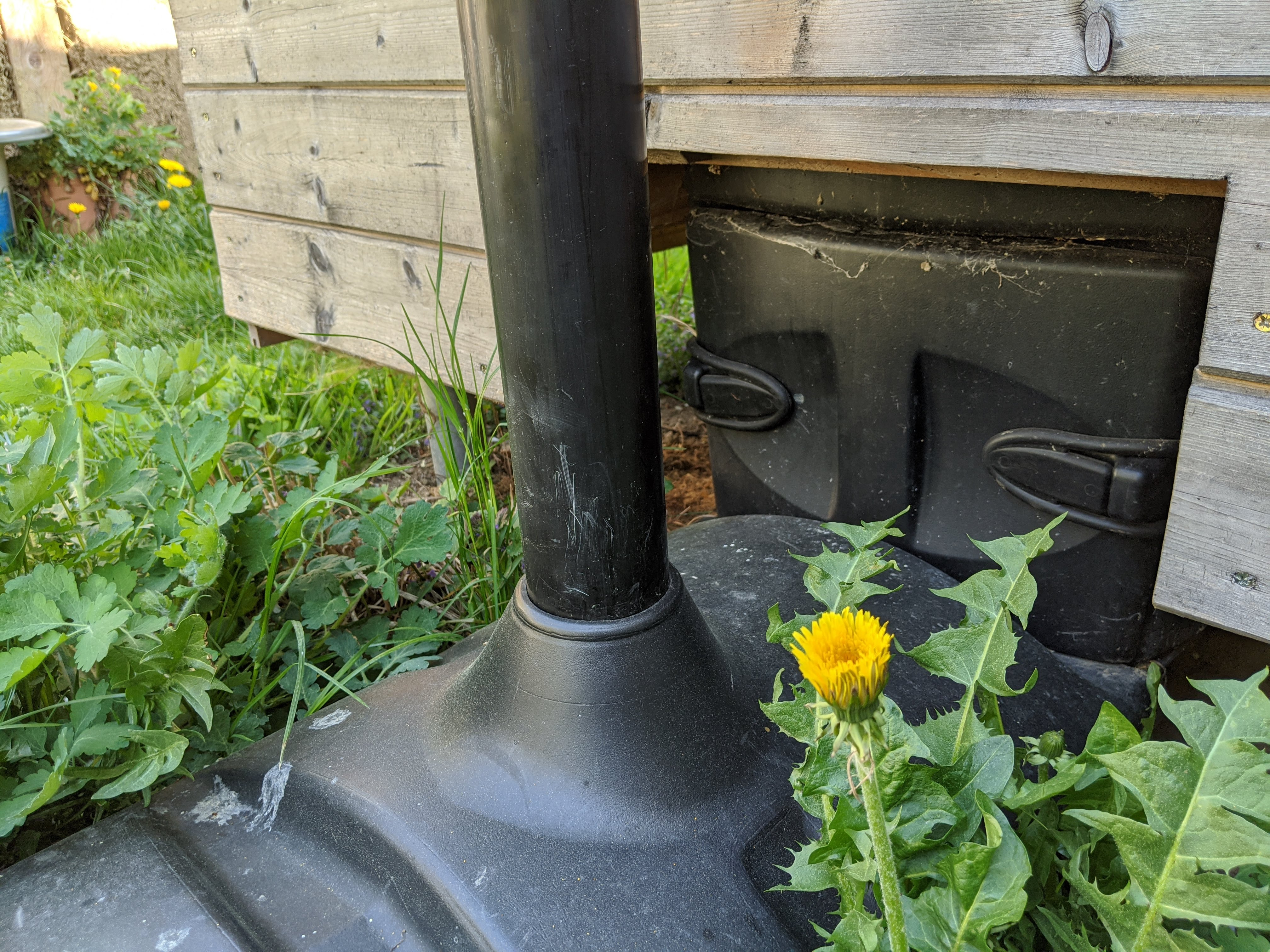 Kompostovací toaleta u Centra Veronica v Hostětíně